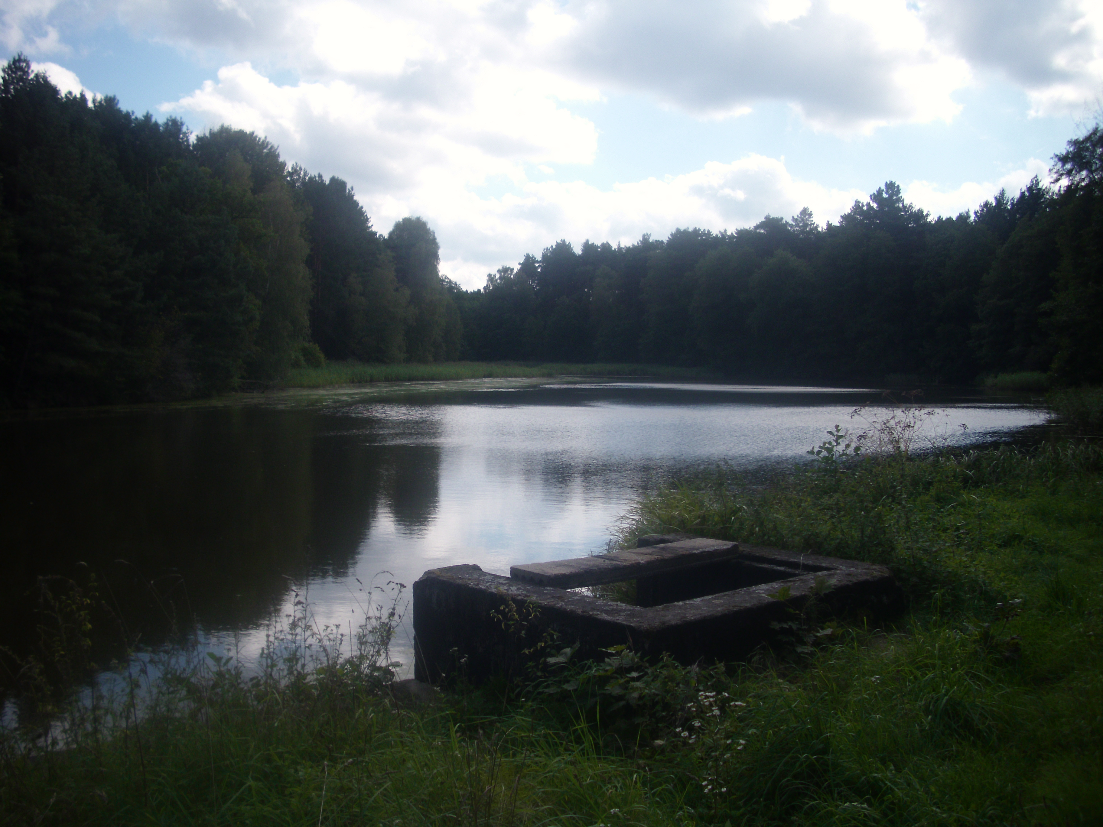 Mühlteich der Jankemühle mit Resten der Anlage, Groß Briesen bei Beeskow, Friedland im Naturpark Schlaubetal, Brandenburg